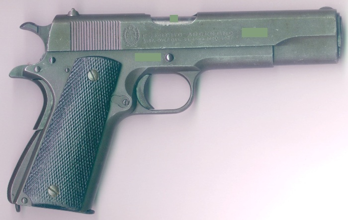 Sistema colt del ejercito, fosfatada y con marcajes extraños